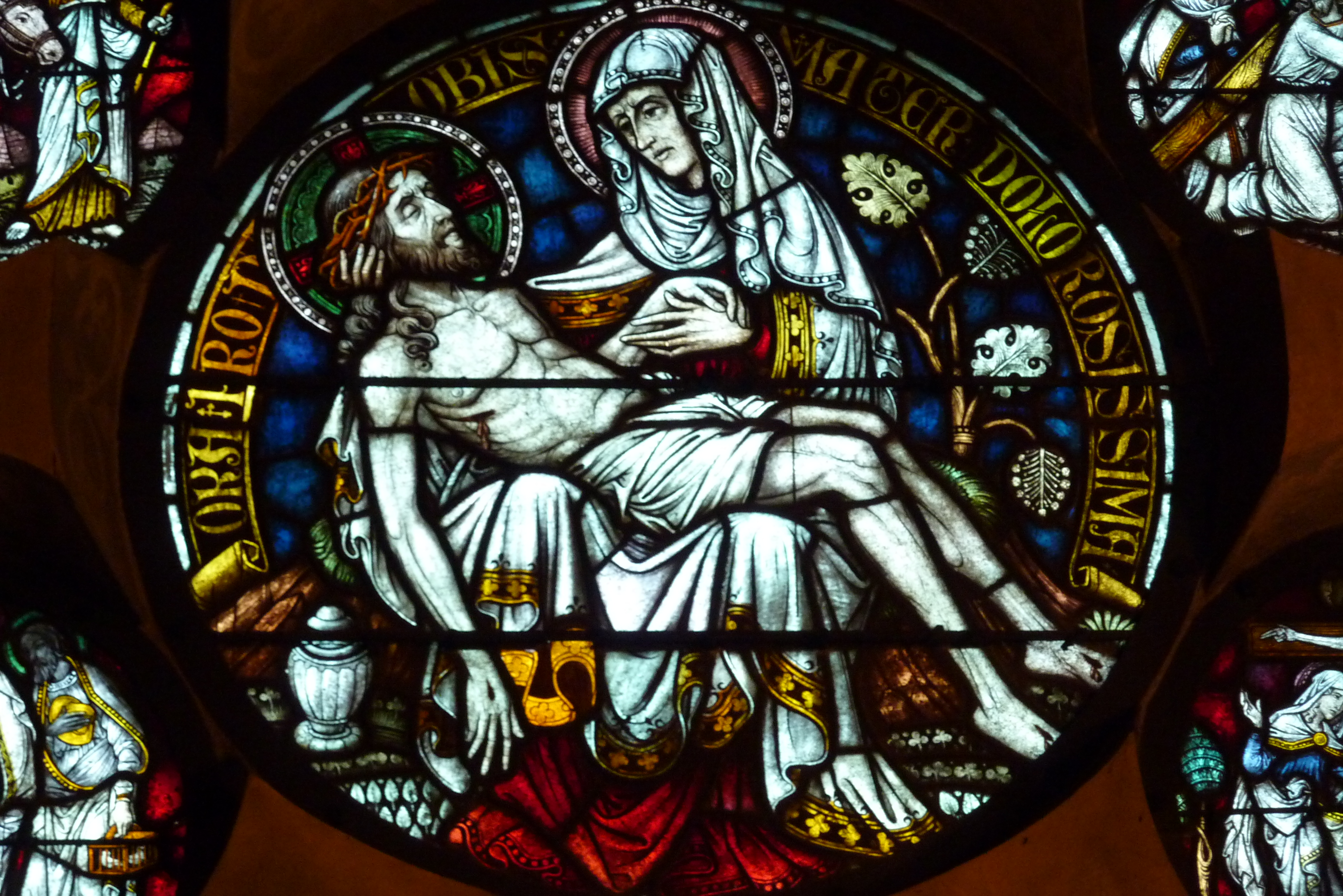 Markuskapelle in Altenberg, Ausschnitt aus dem Bleiglasfenster (ausgeführt um 1900 von der Glasmalerei Schneiders und Schmolz) "7 Schwerzen Mariens" (Fenster nIV), Darstellung: Pieta, hergestellt 1899/1900 von der Glasmalerei Schneiders & Schmolz in Köln (siehe Uwe Gast, Daniel Parello, Hartmut Scholz: Der Altenberger Dom (Monumente der Glasmalerei 2), Schnell & Steiner, Regensburg 2008, S. 83-89, ISBN 978-3-7954-1960-8)